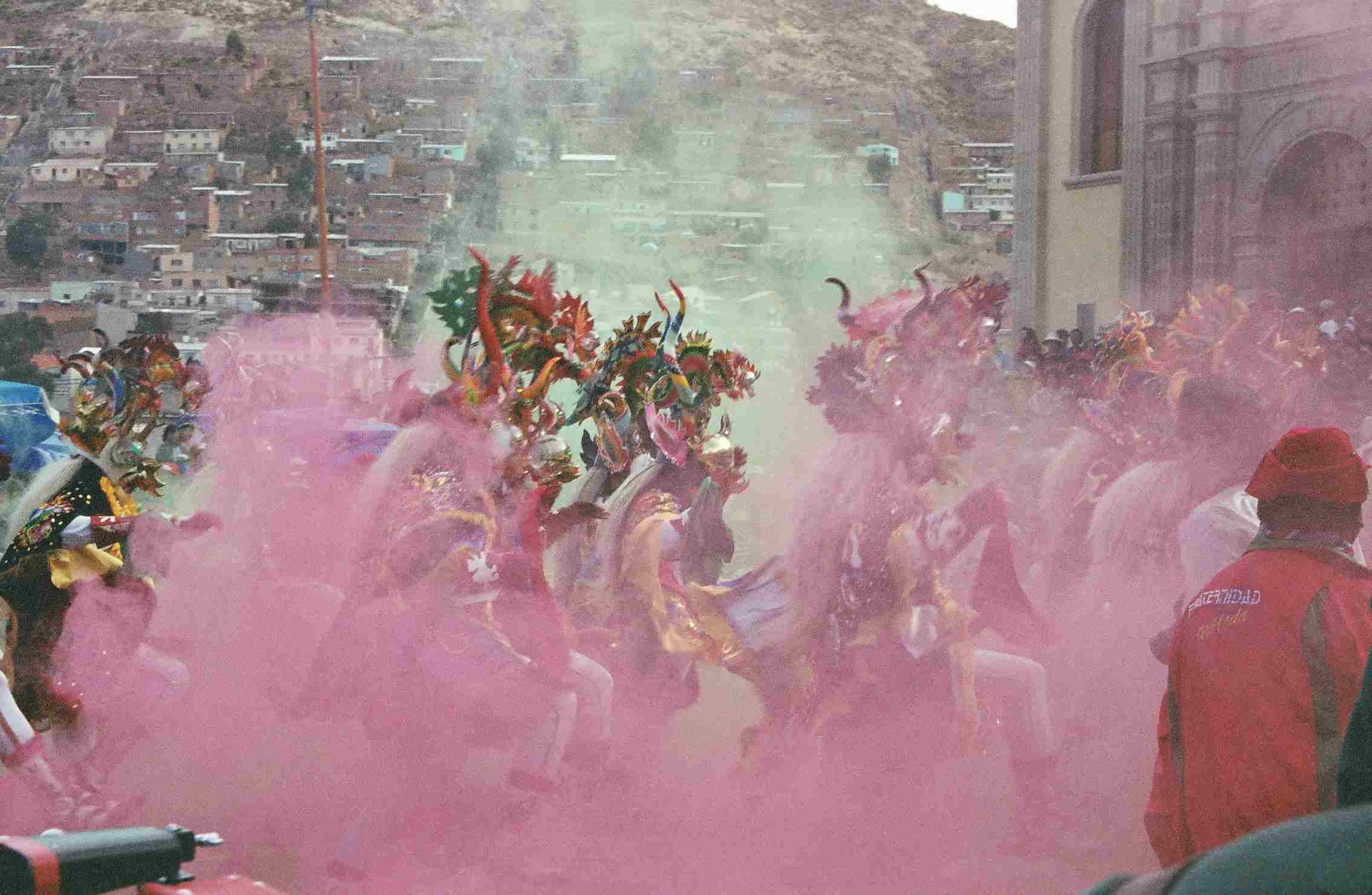 Imagen del Carnaval de Oruro, obtenida durante las celebraciones en el verano del año 2005.